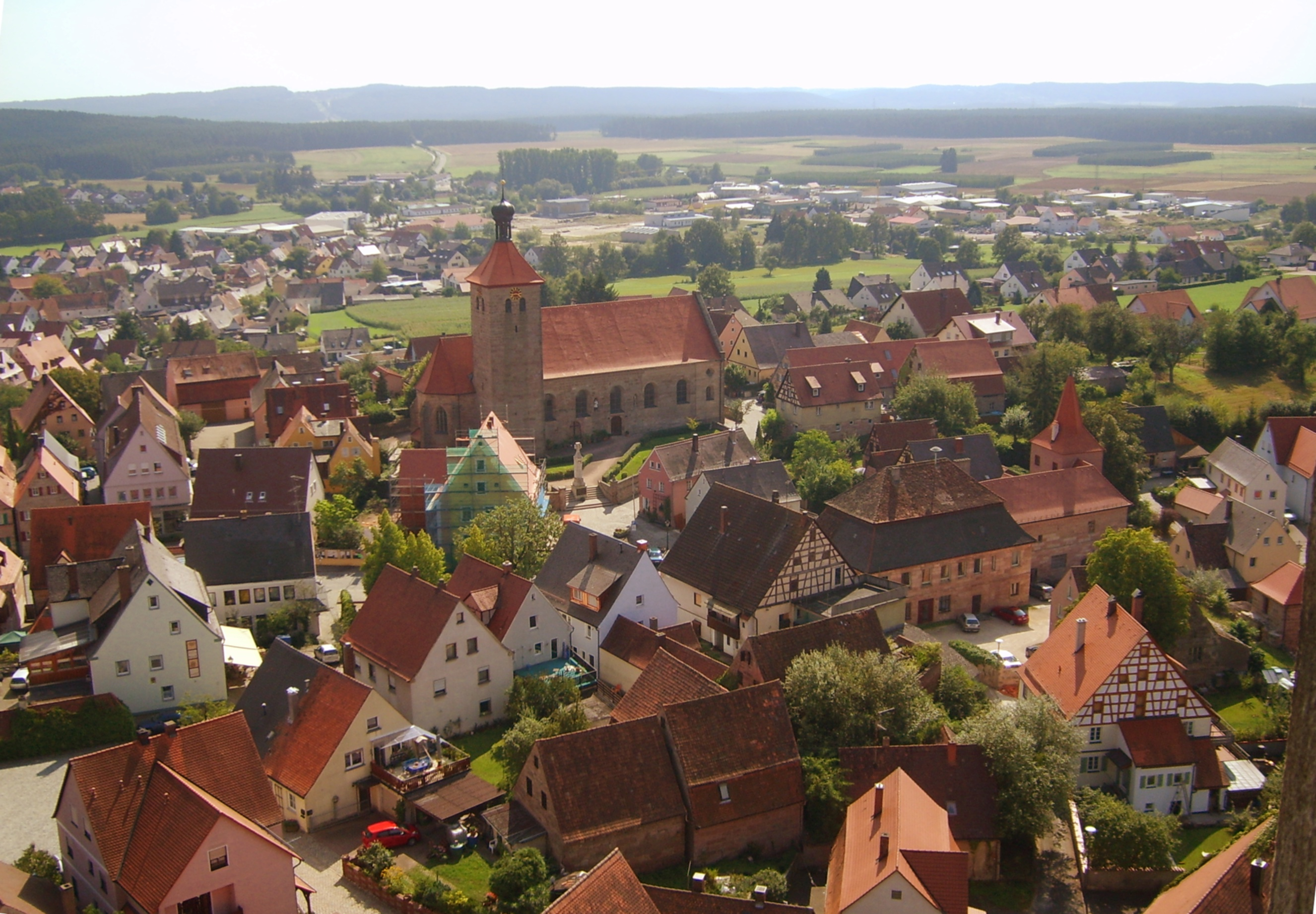 Abenberg mit St. Jakobuskirche